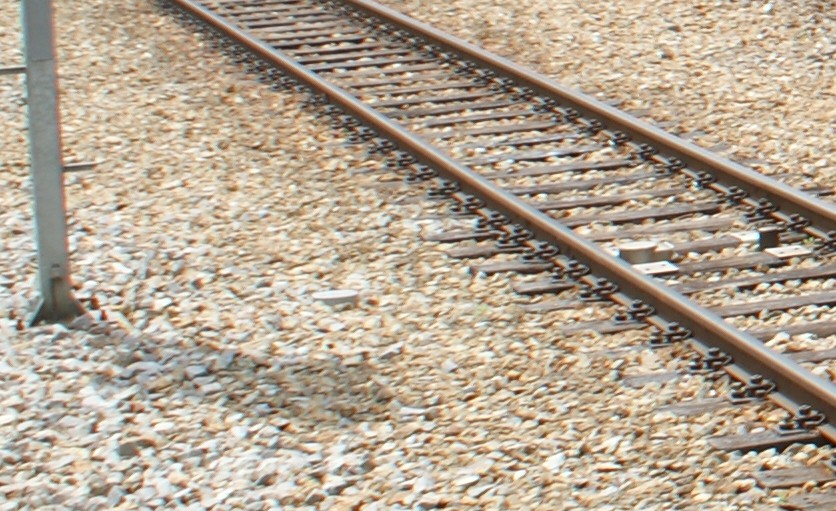 Station Realp der MGB: Hauptsignal mit Vorsignal und Zugsicherung ZSI-90